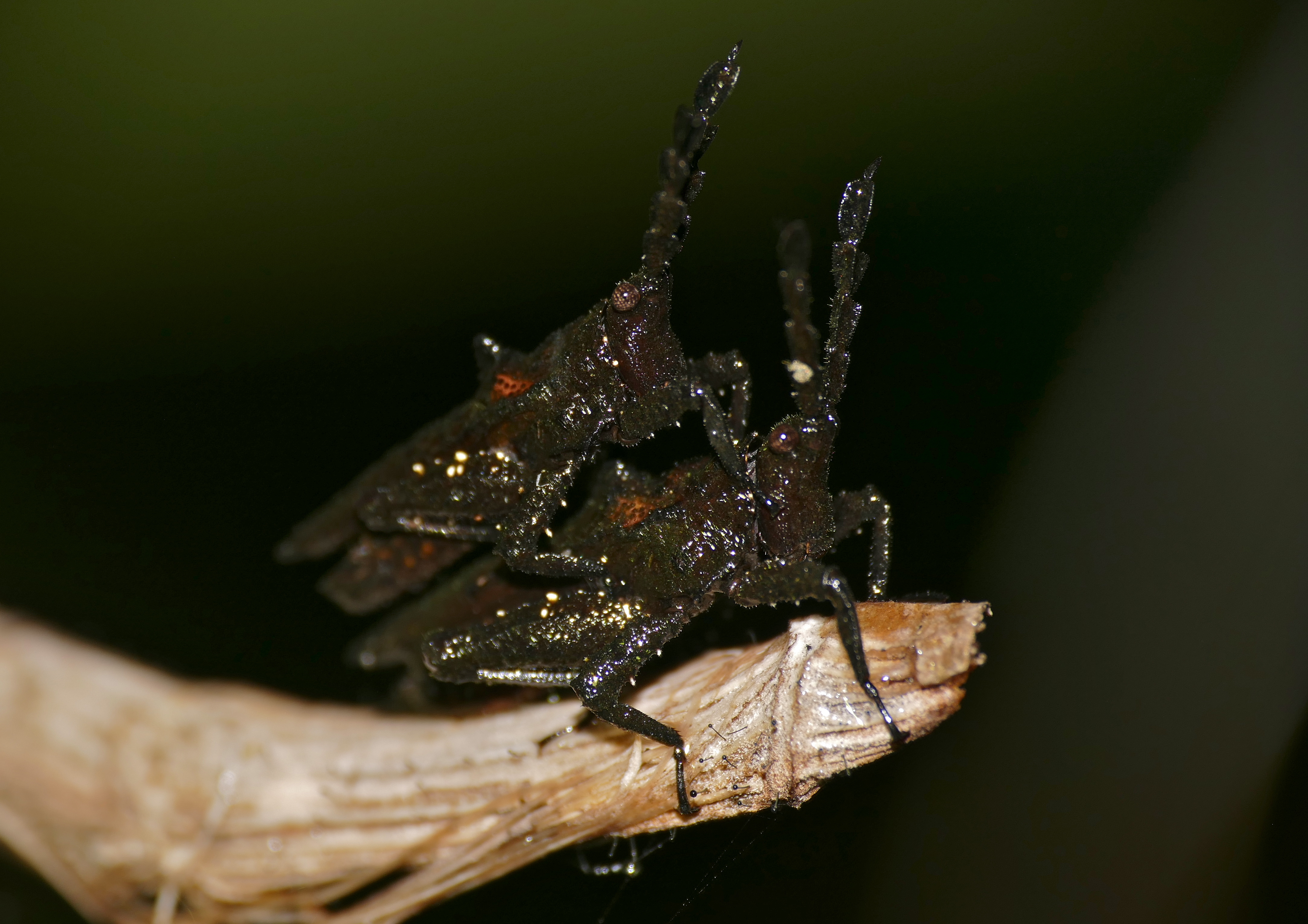 Mulu NP, Sarawak, MALAYSIA